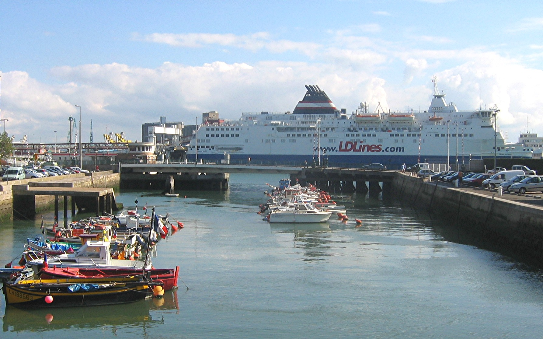 Ferry NORMAN SPIRIT, port du Havre